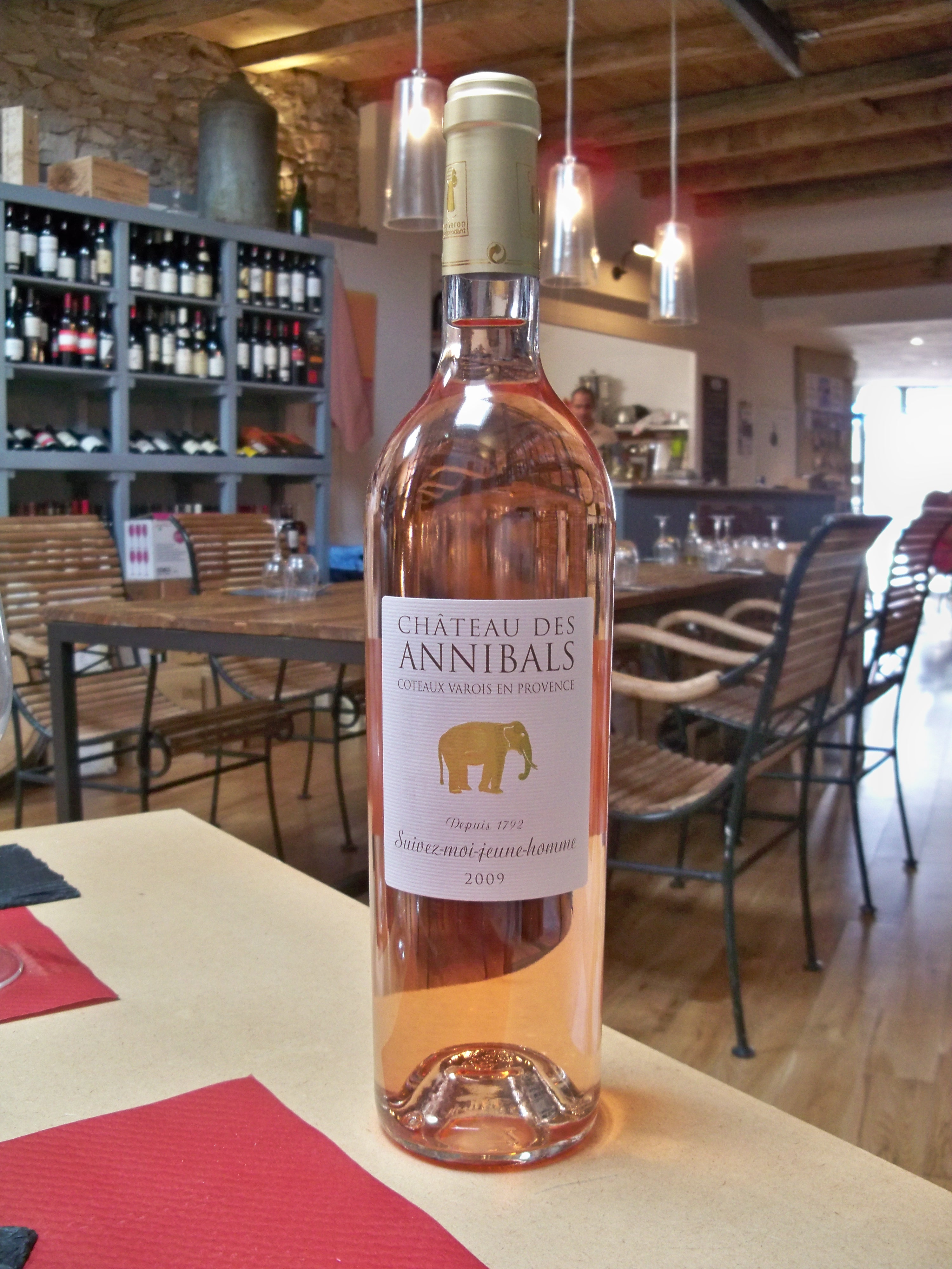 Bouteille de Coteaux Varoi de Provence AOC